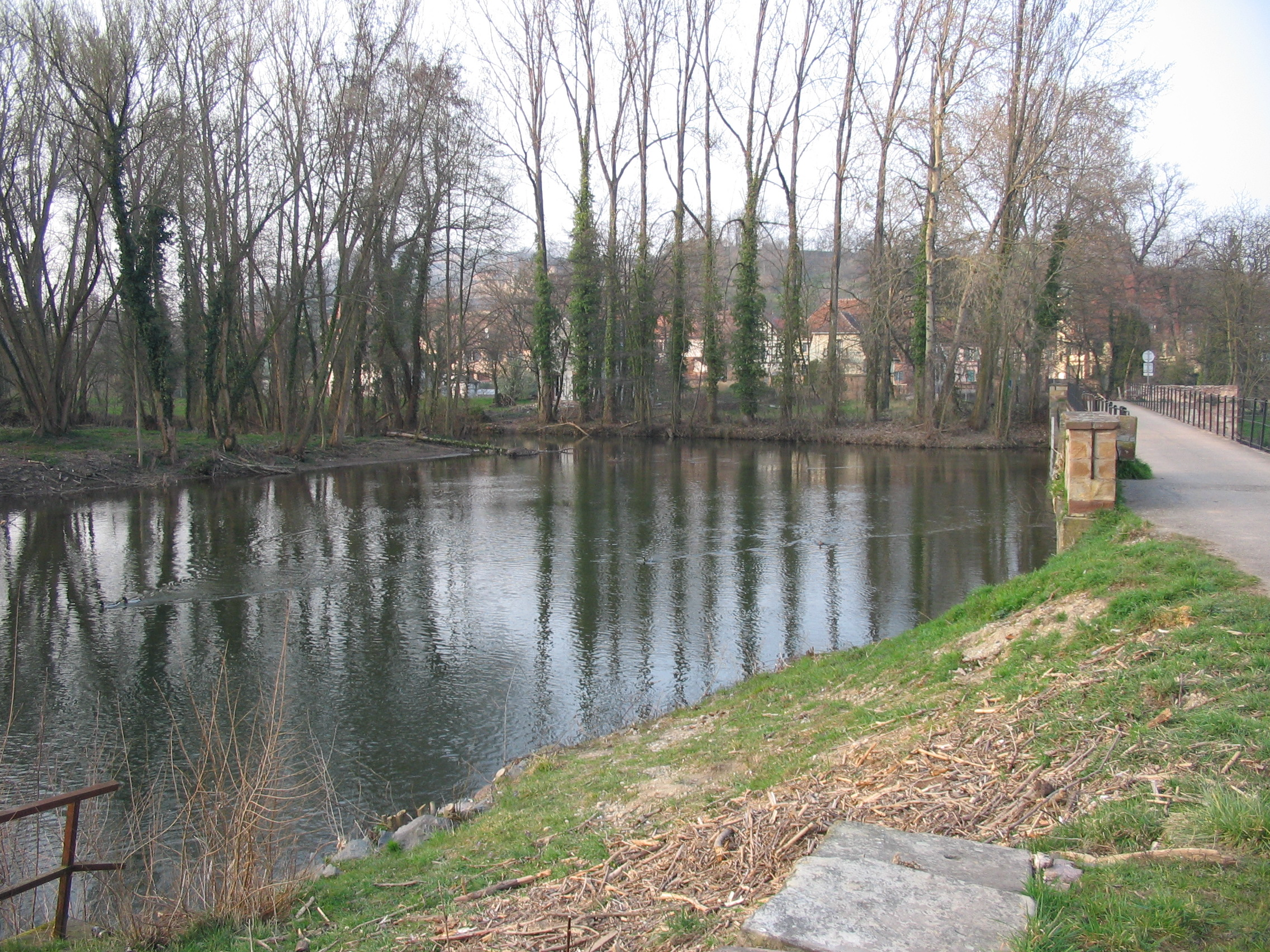 confluence de la Mossig et de la Bruche à Wolxheim, dans le Bas-Rhin